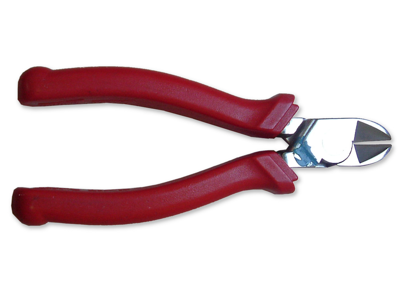 Photo eines Seitenschneiders